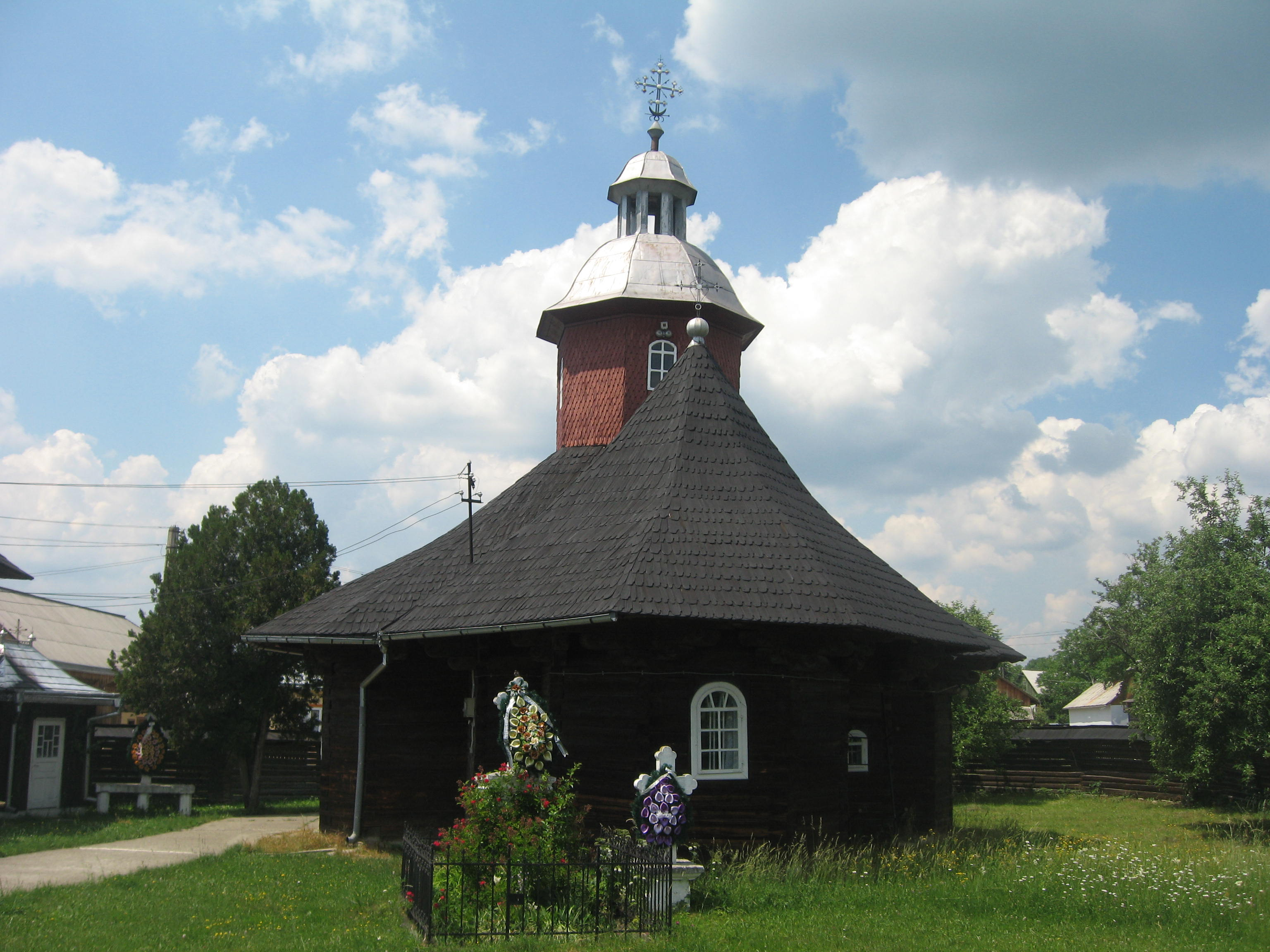 Biserica de lemn din Pârteştii de Sus, judeţul Suceava